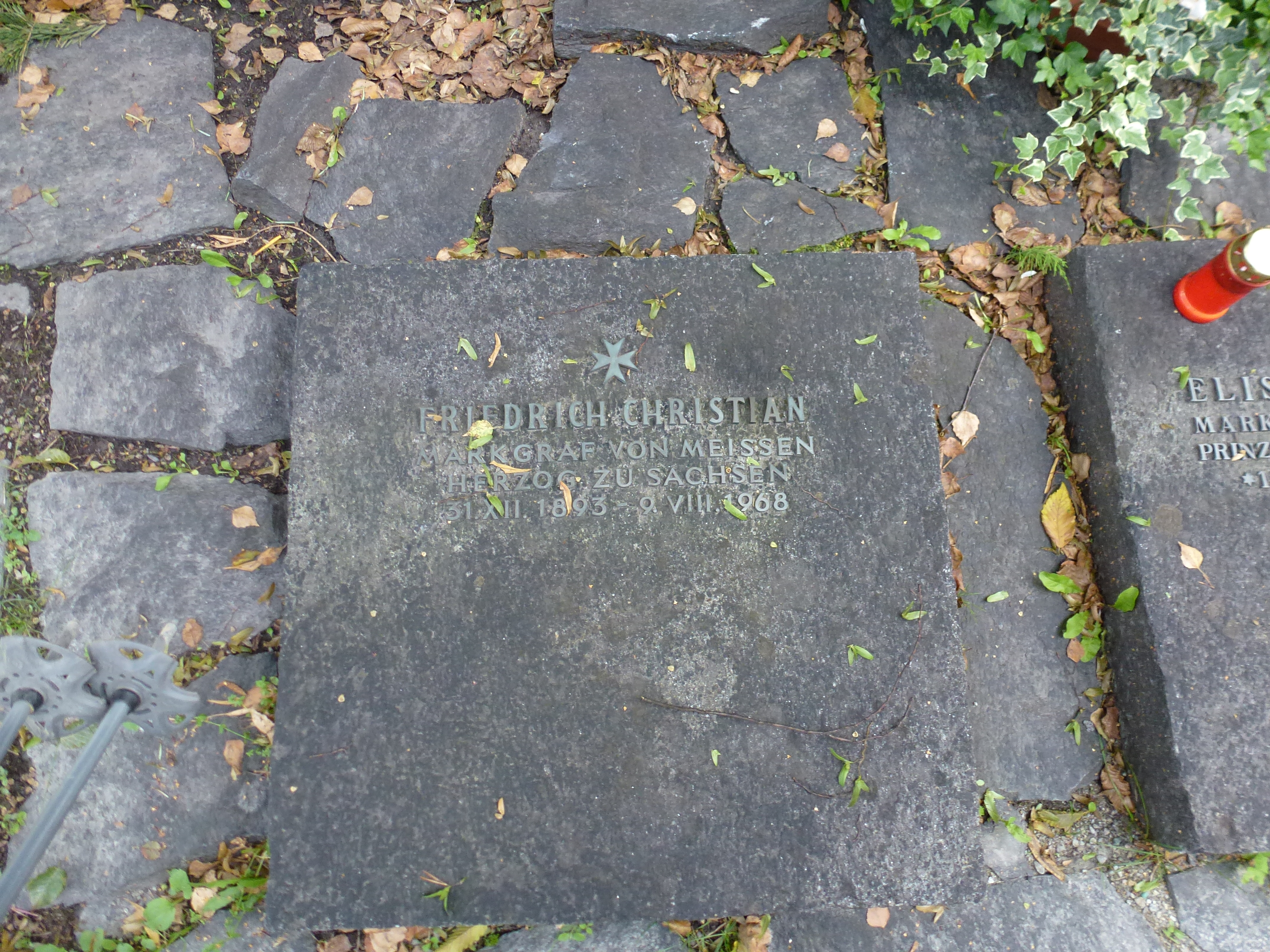 Grablege der Wettiner bei der Königskapelle Karrösten – Friedrich Christian Markgraf von Meißen Herzog zu Sachsen